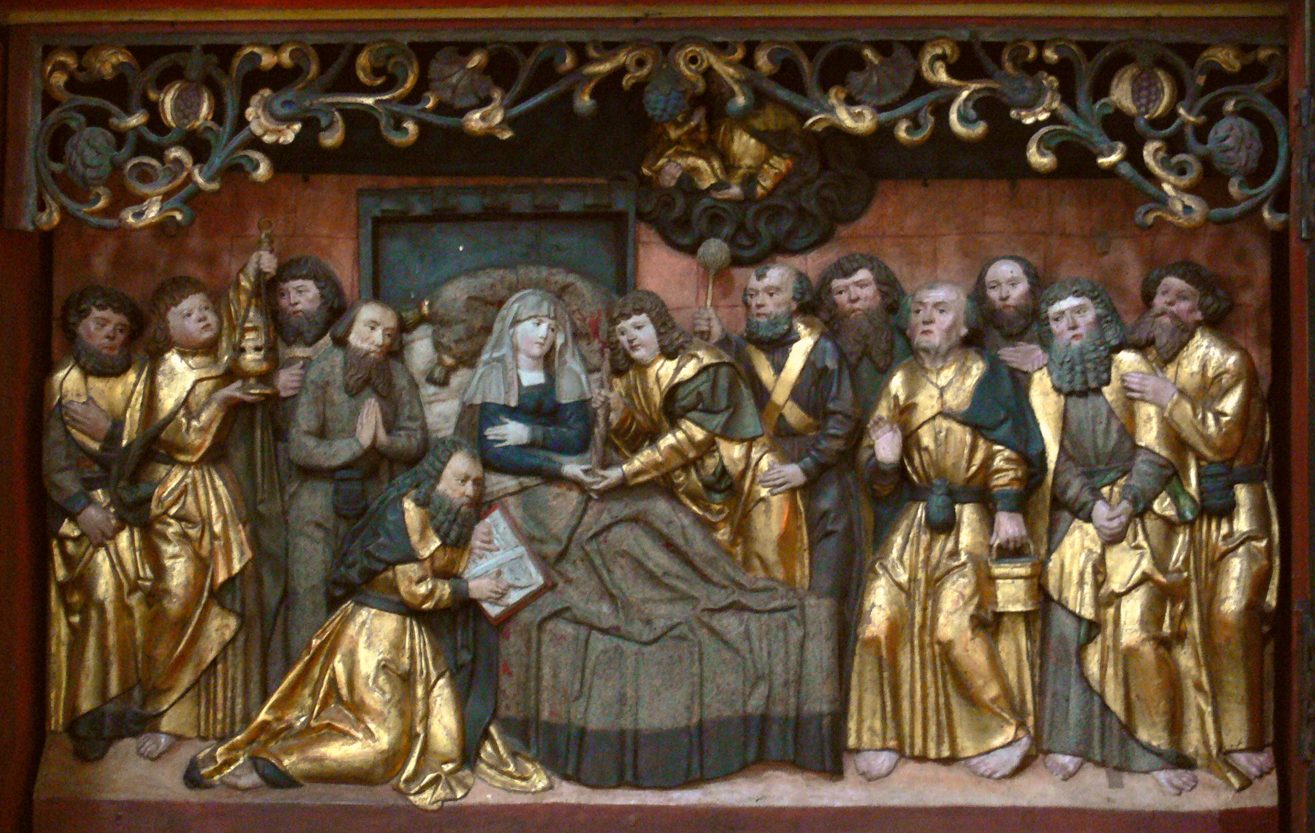 Bamberg, Dom Kirchgattendorfer Altar, Mitteltafel der Predella: Tod Mariens